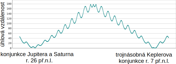 Konjunkce Jupiteru a Saturnu se opakují co 19 let. Keplerova konjunce roku 7 př.n.l. byla mimořádná tím, že byla trojnásobná, trvala prakticky necelý rok a objevila se na začátku 19letého cyklu babylonského kalendáře. Vytvořeno pomocí aplikace WebGeoCalcː